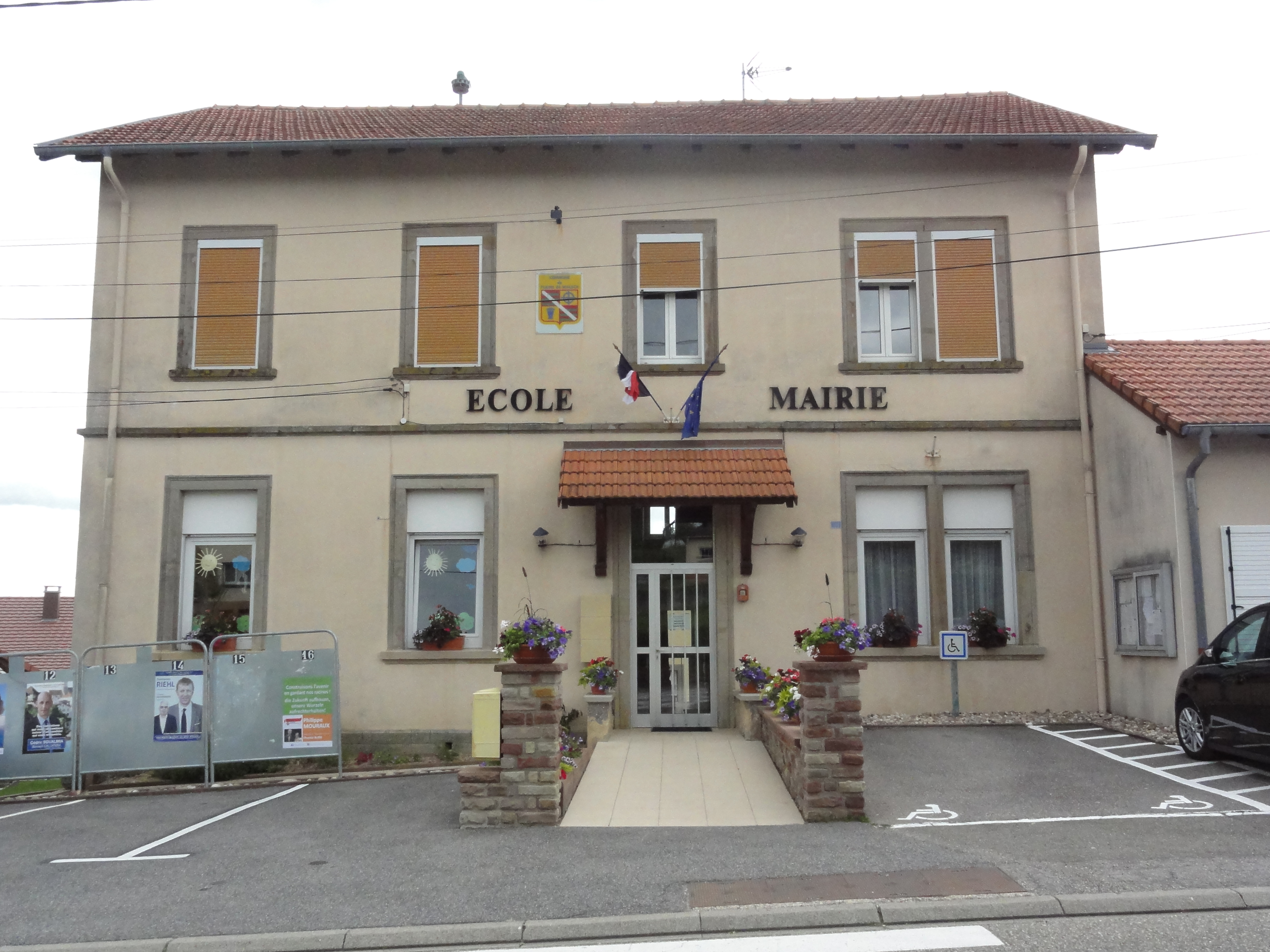 Plaine-de-Walsch (Moselle) mairie - école